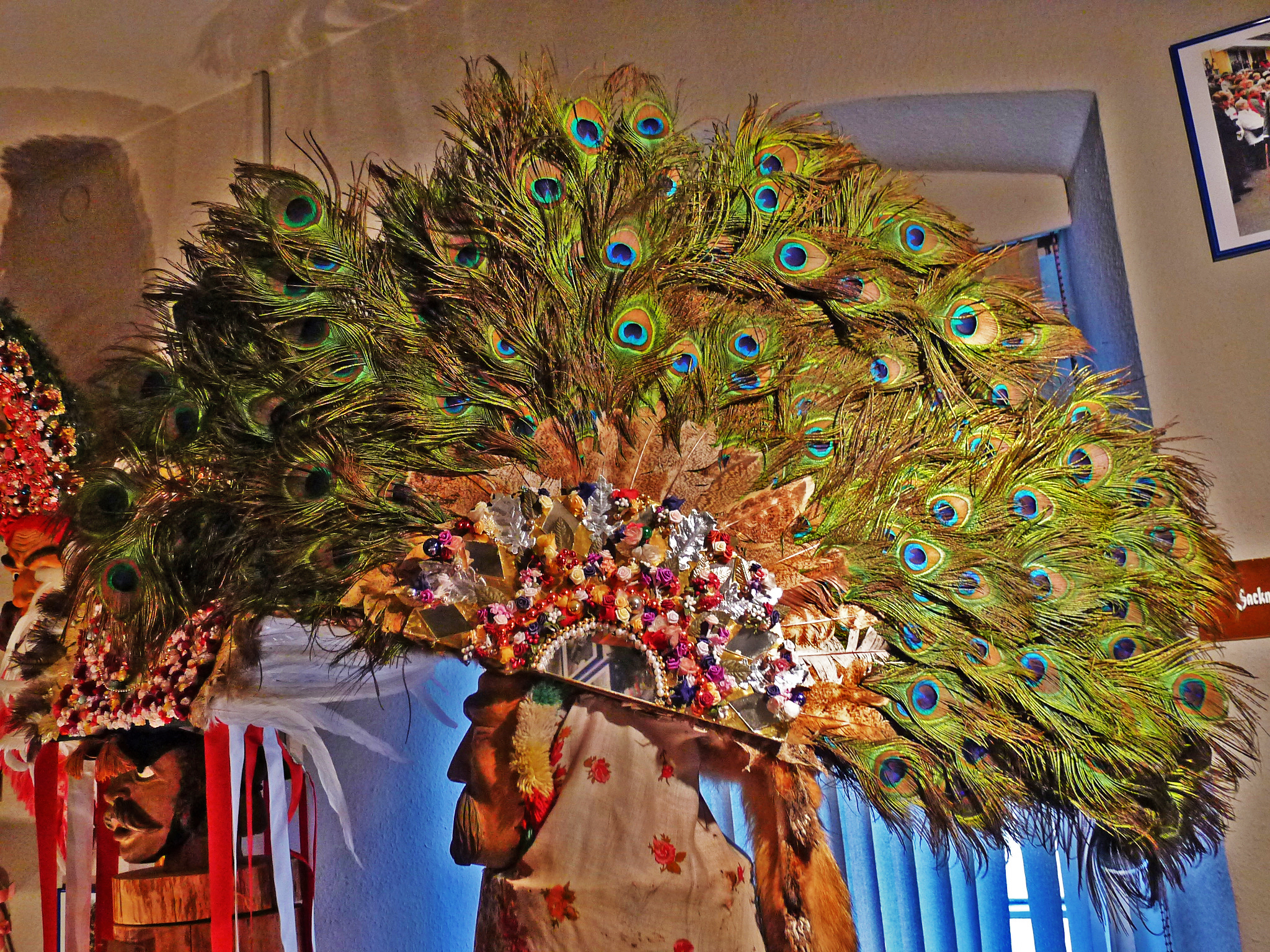 Zaggeler-Maske von der Figur des Mullerlaufens der MARTHA-Dörfer, hier in der Oberrheinischen Narrenschau Kenzingen ausgestellt